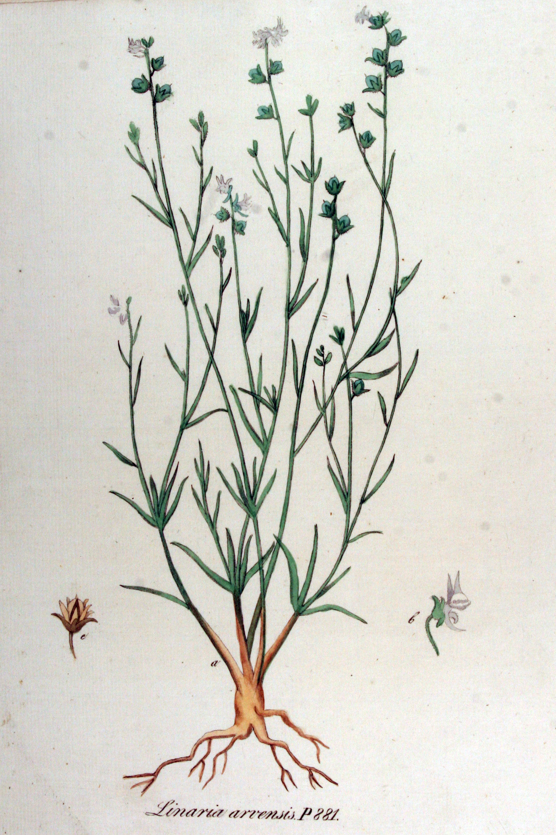 Linaria arvensis (L.) Desf.